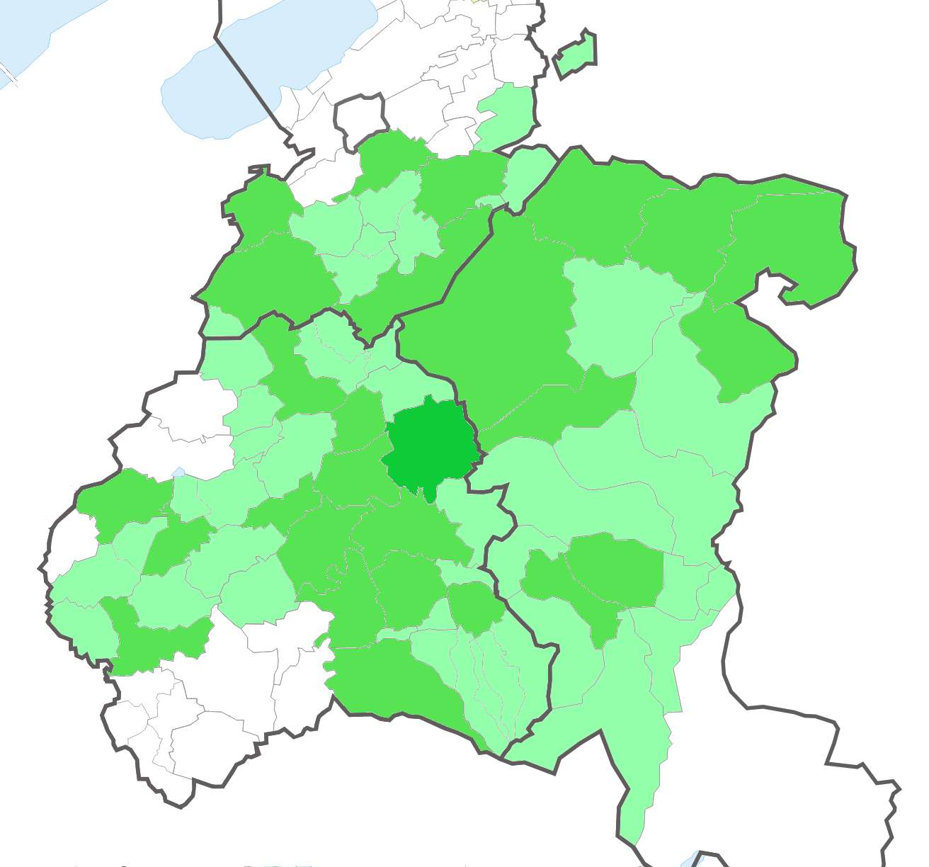 Die Alte Landschaft der Stadt Freiburg im Üechtland (Die Grenzen entsprechen den Gemeinde- und Bezirksgrenzen von 1999; abgebildet sind der See-, der Saane- und der Sensebezirk) dunkelgrün: Stadt Freiburg Grün: Gemeinden, die damals Sitz der Pfarrei waren hellgrün: Gemeinden, die 1999 selbständig waren, damals aber Teil einer der 26 Pfarreien war